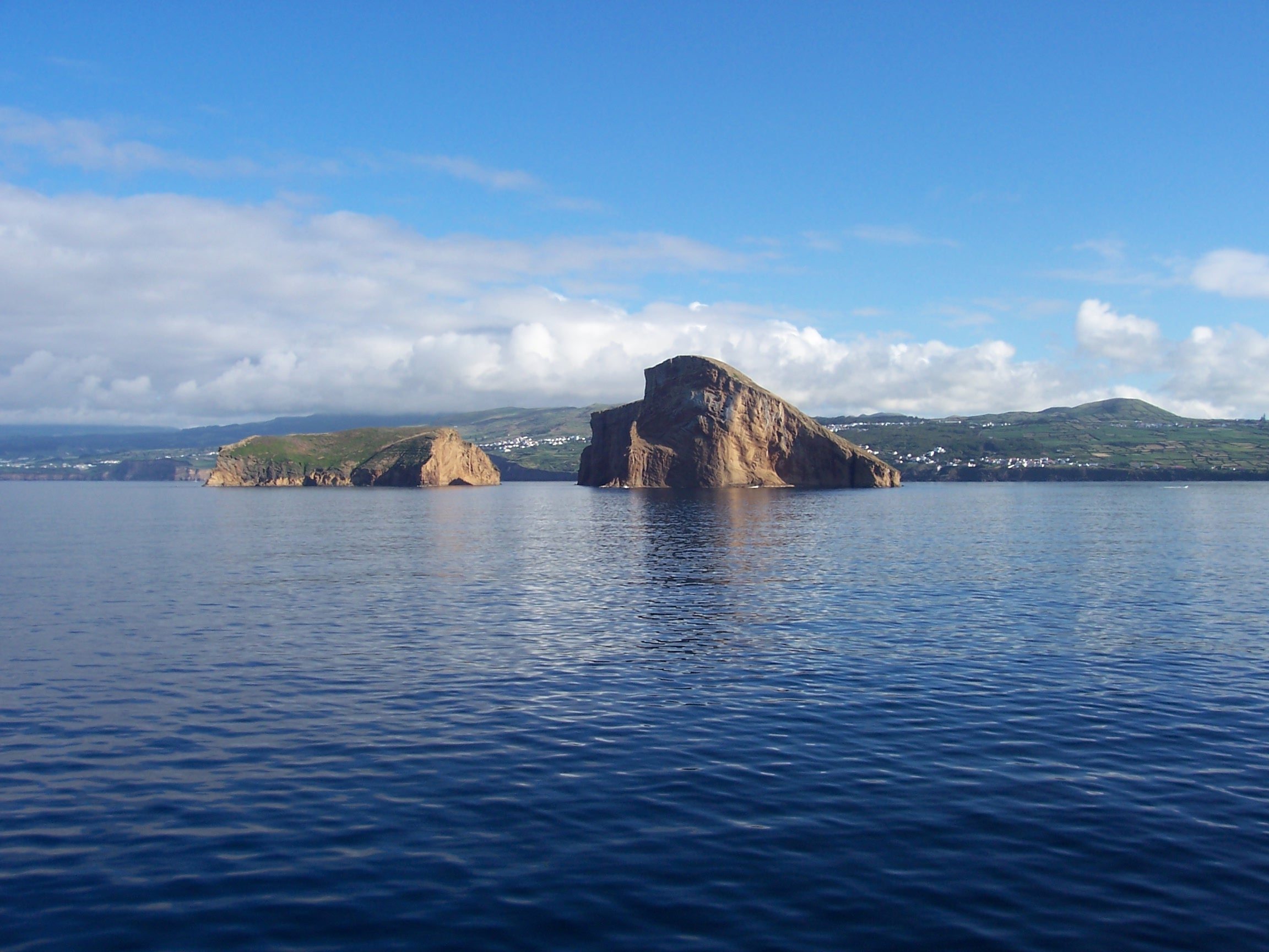 Ilhéus das Cabras, vistos do Mar, ilha Terceira, Açores, Portugal.